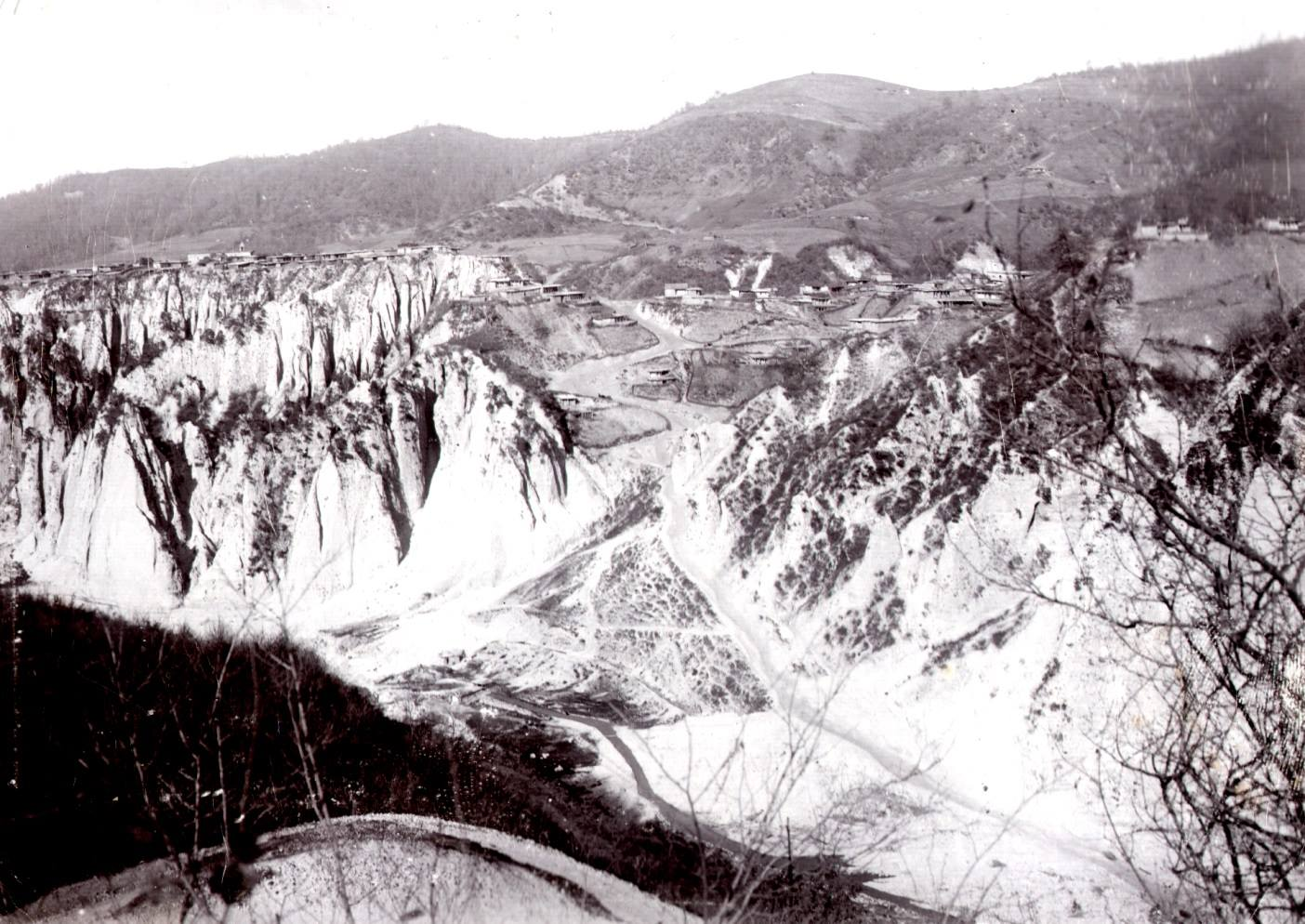 Алмак 1905 год.